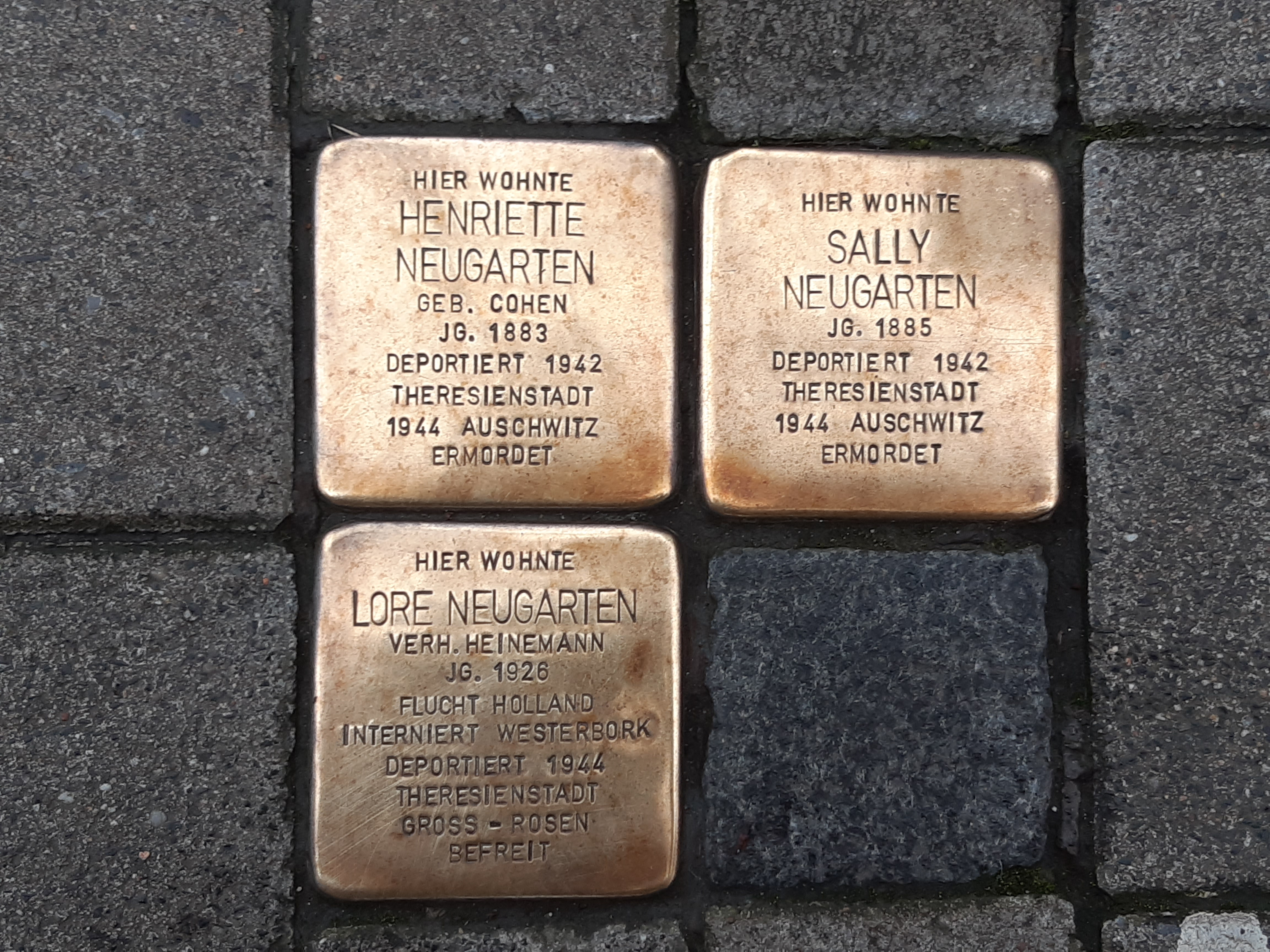 Stolpersteine Kaiserstraße 44 in Dortmund